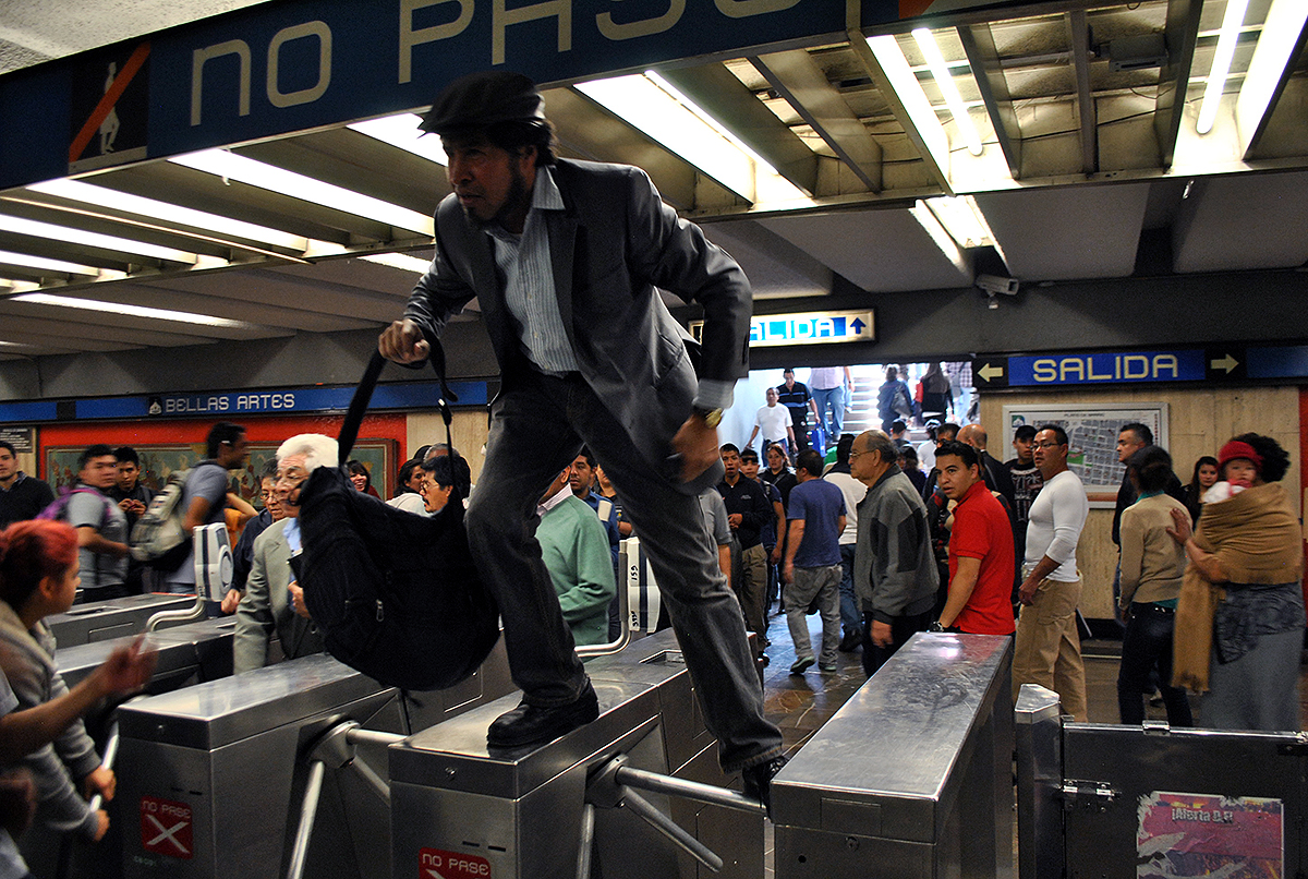 Manifestantes saltaron los accesos al Metro de la Ciudad de México en la estación Bellas Artes.